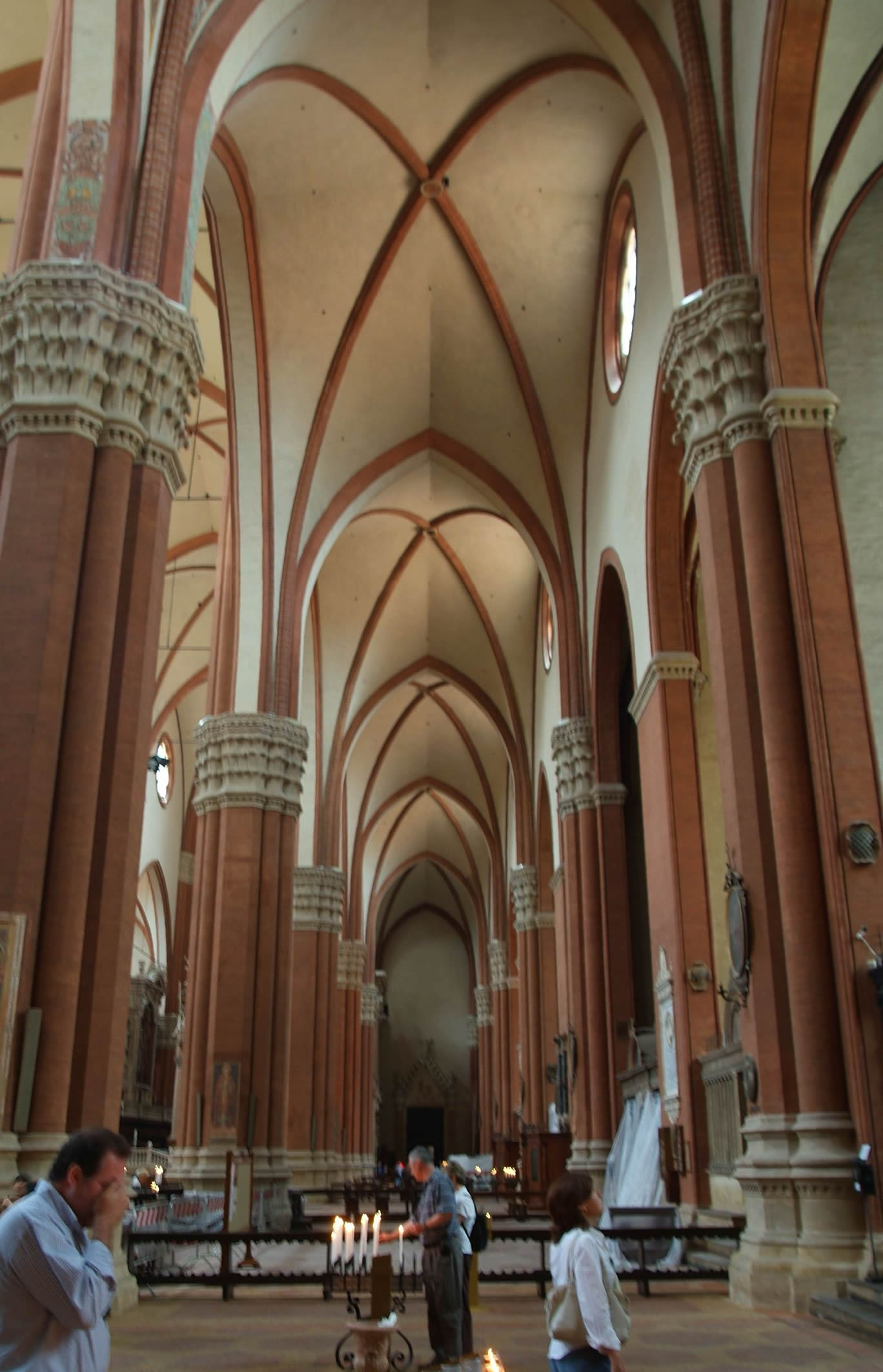 Volte gotiche della chiesa di San Petronio (Bologna).